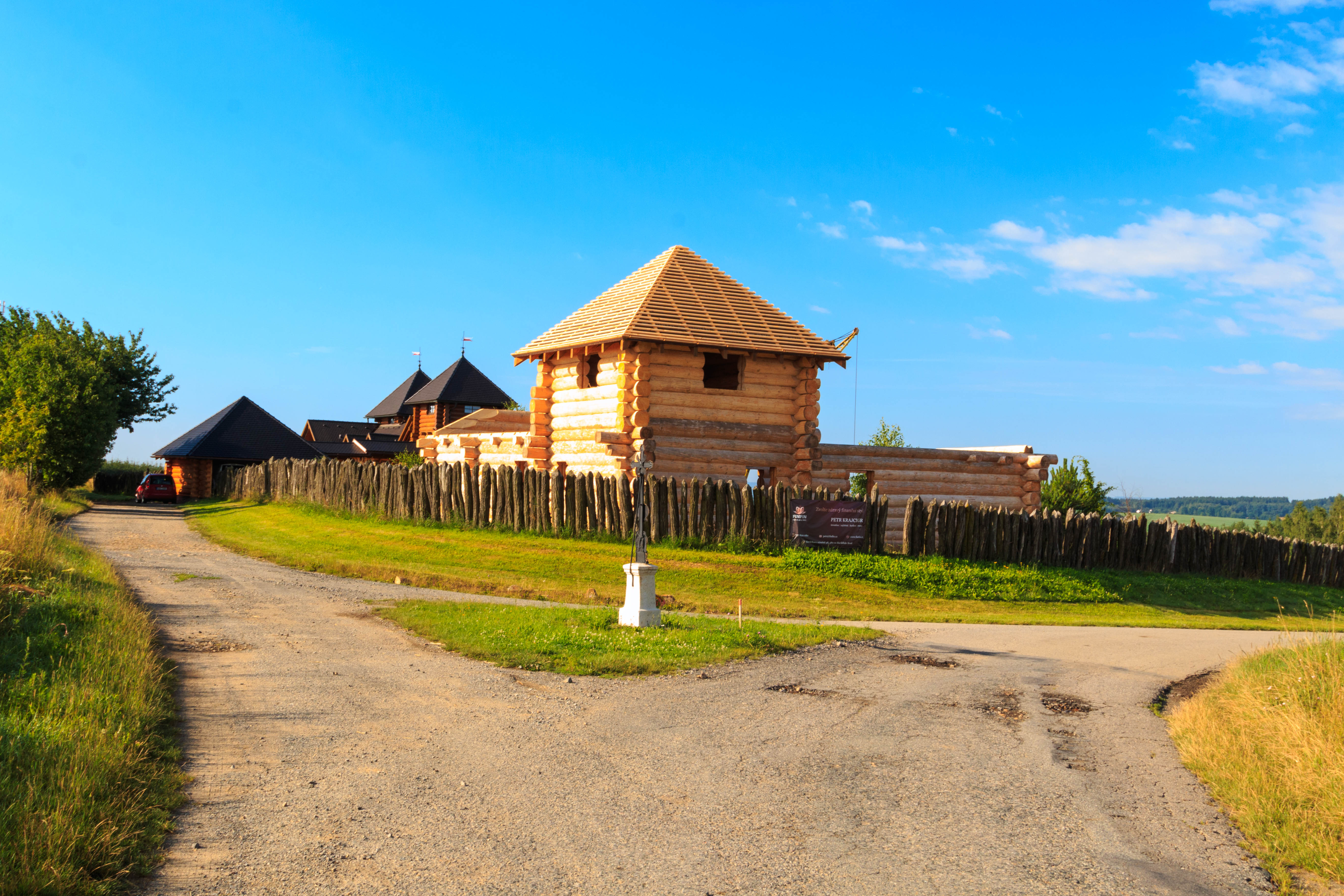 Zálesí u Horní Krupé - Gerstainova usedlost